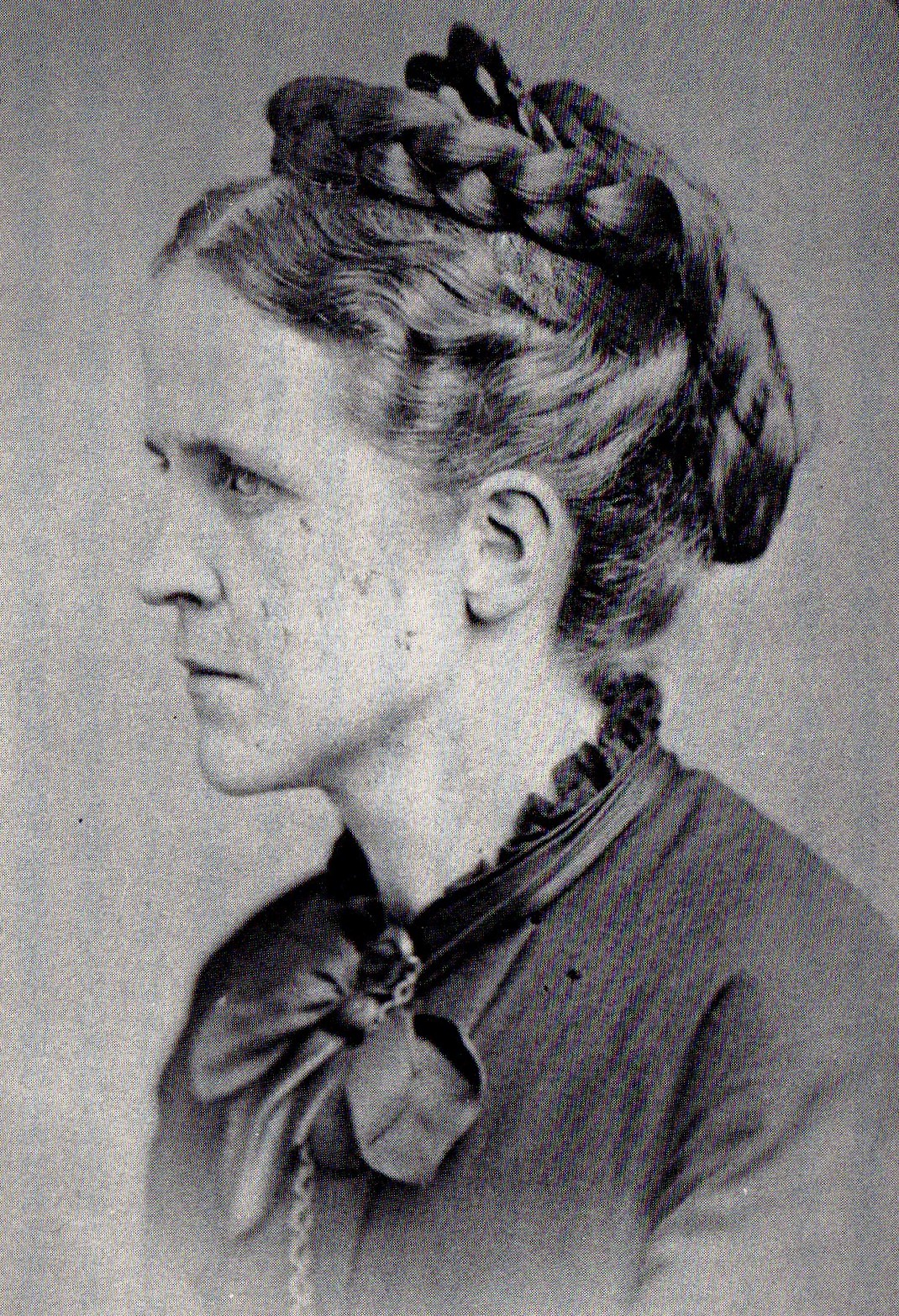 婦人一致海外伝道局より中国宣教に派遣された頃の、メアリー・トゥルー